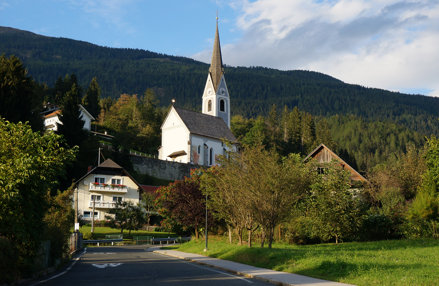 Berg im Drautal mit Blick zur Kath. Pfarrkirche hl. Maria Geburt, Bezirk Spittal an der Drau, Kärnten, Österreich, Europäische Union